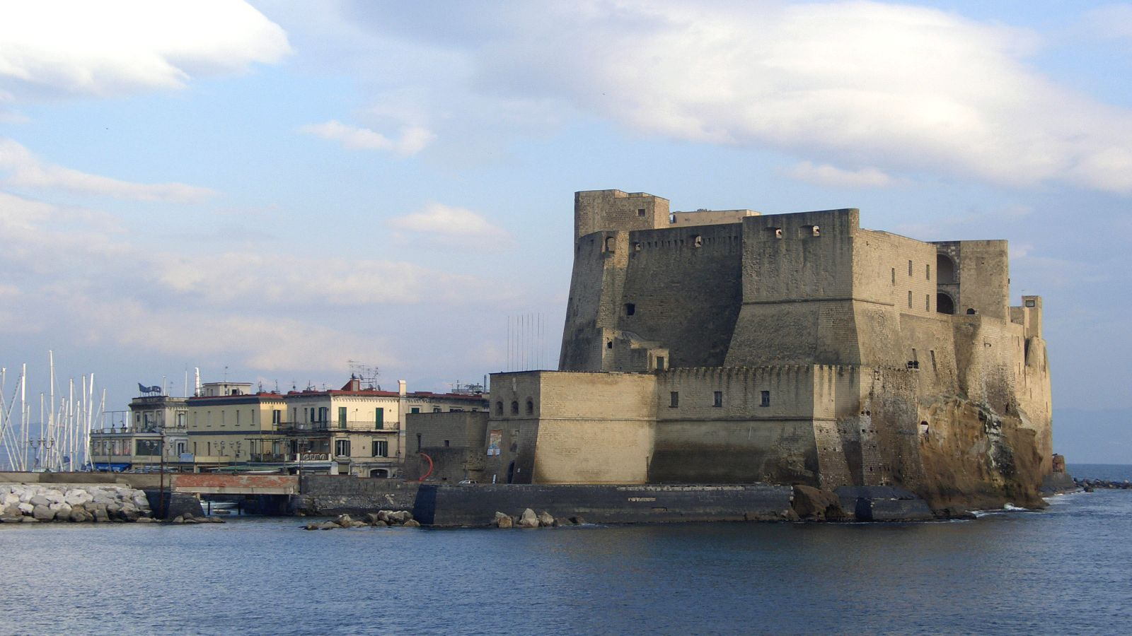 Napoli, Italia8967_castell-delovo